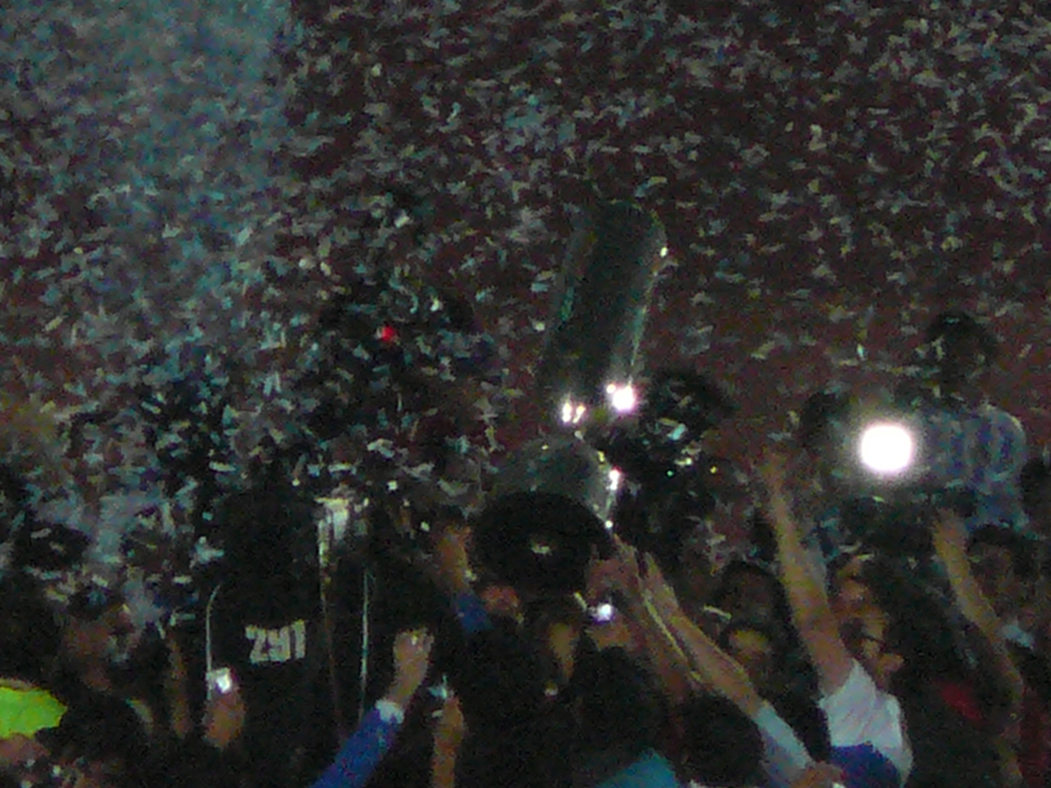 Festejo de Universidad Católica tras coronarse campeòn de Copa Chile 2011